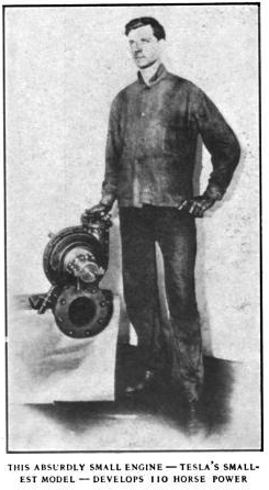 Tesla turbine, small